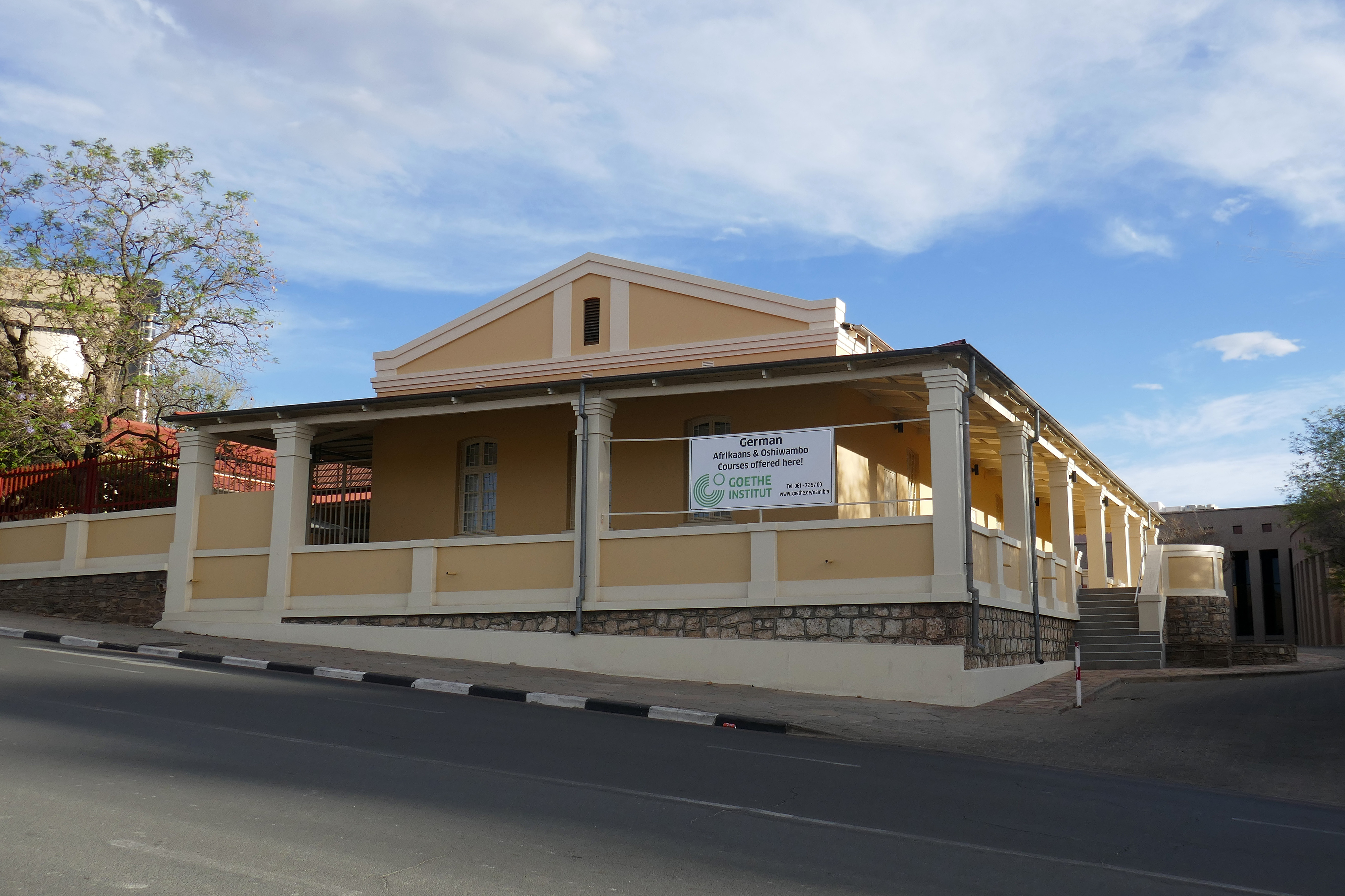 Le Goethe Institut à Windhoek (Namibie).